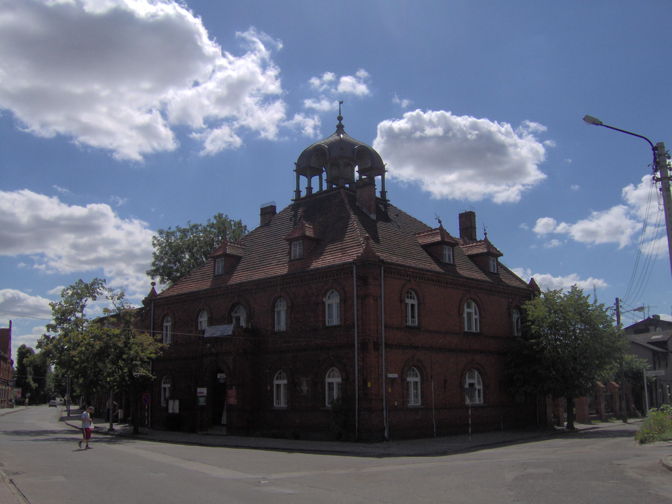 Ratusz w Gniewkowie